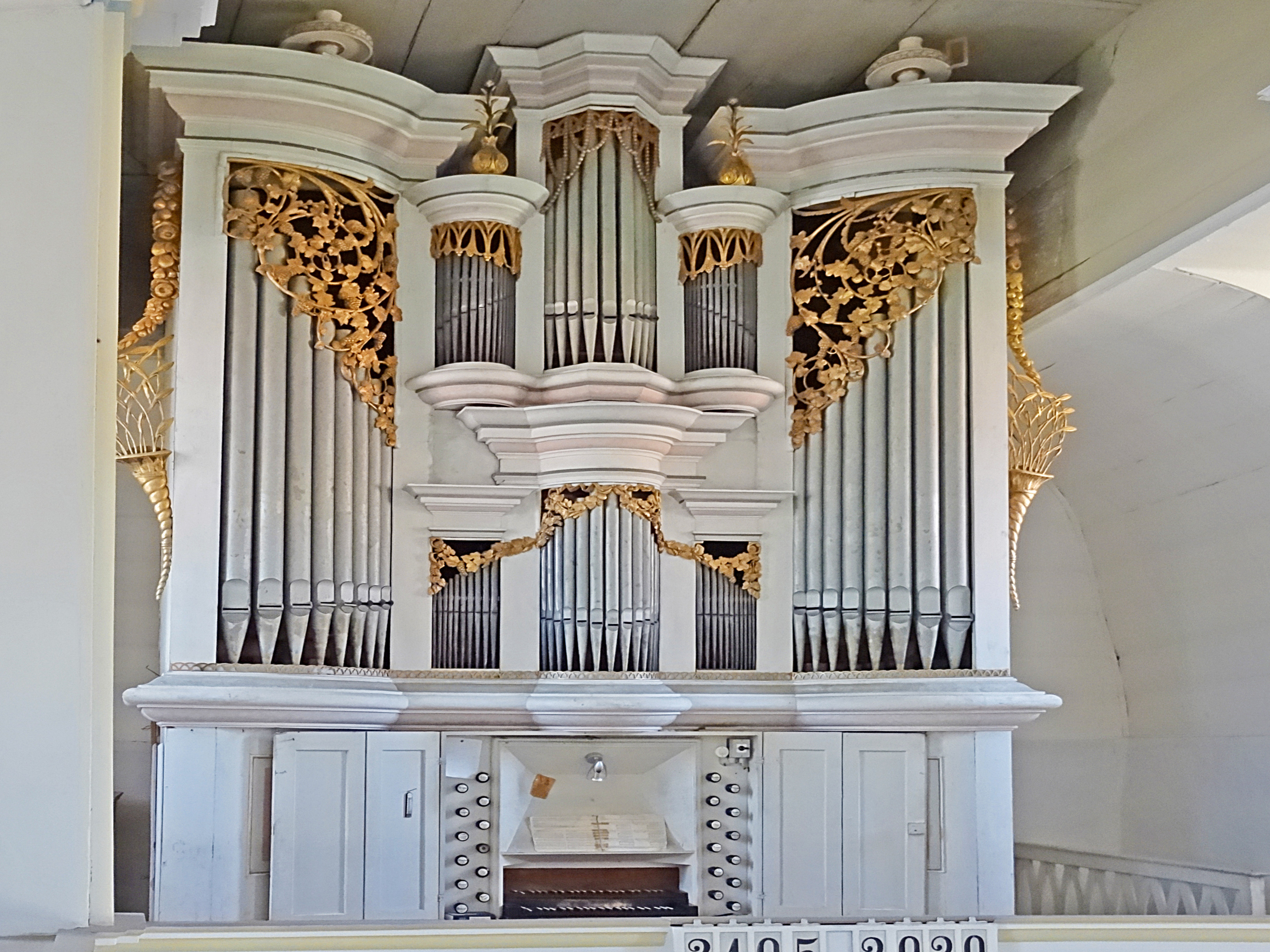 Orgel von Michael und Johannes Wagner (vor 1800, II/P 21) in der Dorfkirche Heyda